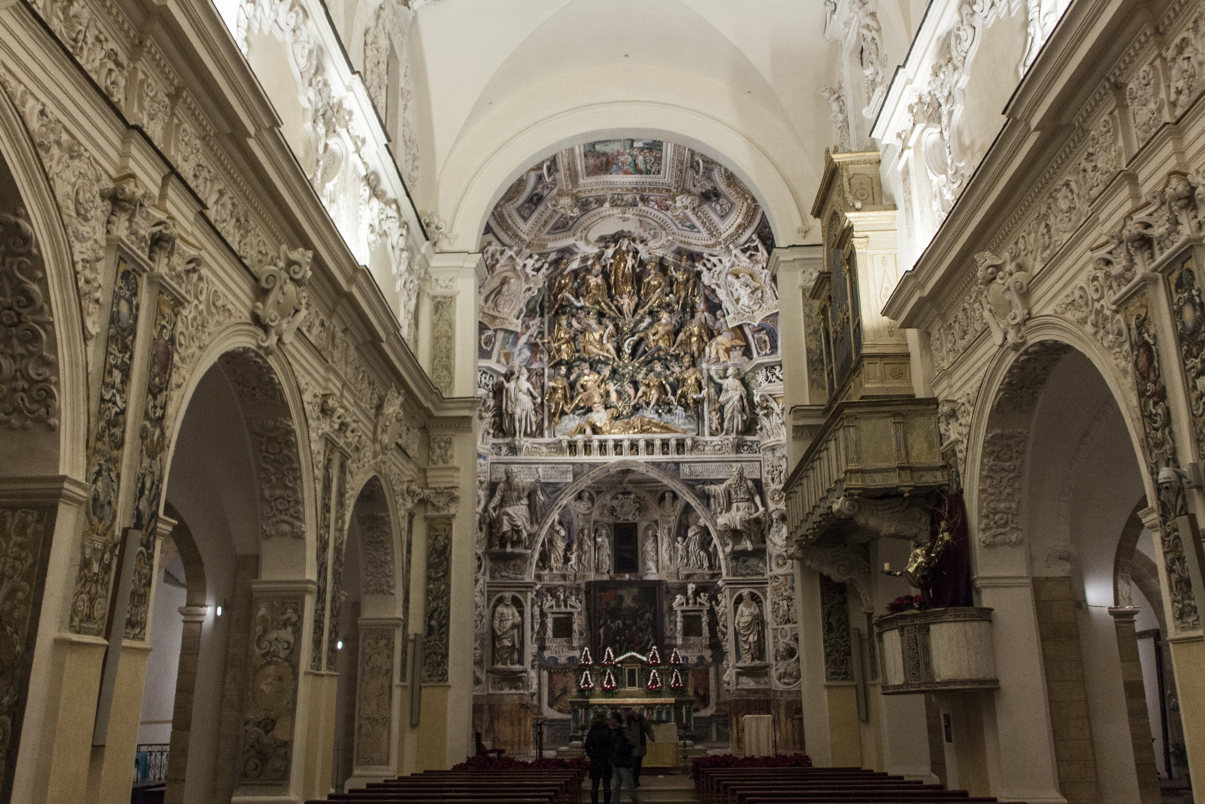 Chiesa di San Domenico (Castelvetrano). Apparato architettonico, plastico e pittorico realizzato da Antonio Ferraro coadiuvato dai figli Tommaso e Orazio.